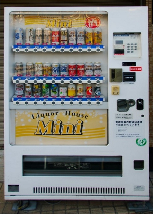 alcohol